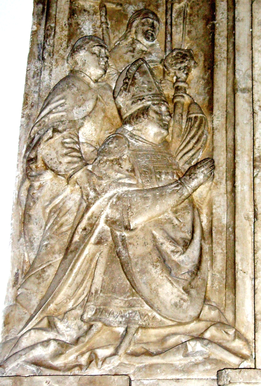 Christoph Marschall von Pappenheim Bischof von Eichstätt 1535-1539, Epitaph im Eichstätter Dom